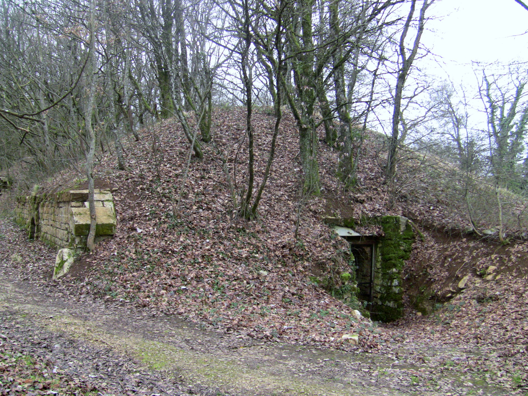 La traverse-abri I de la batterie ouest du fort de Planoise, à Besançon (Doubs, France).